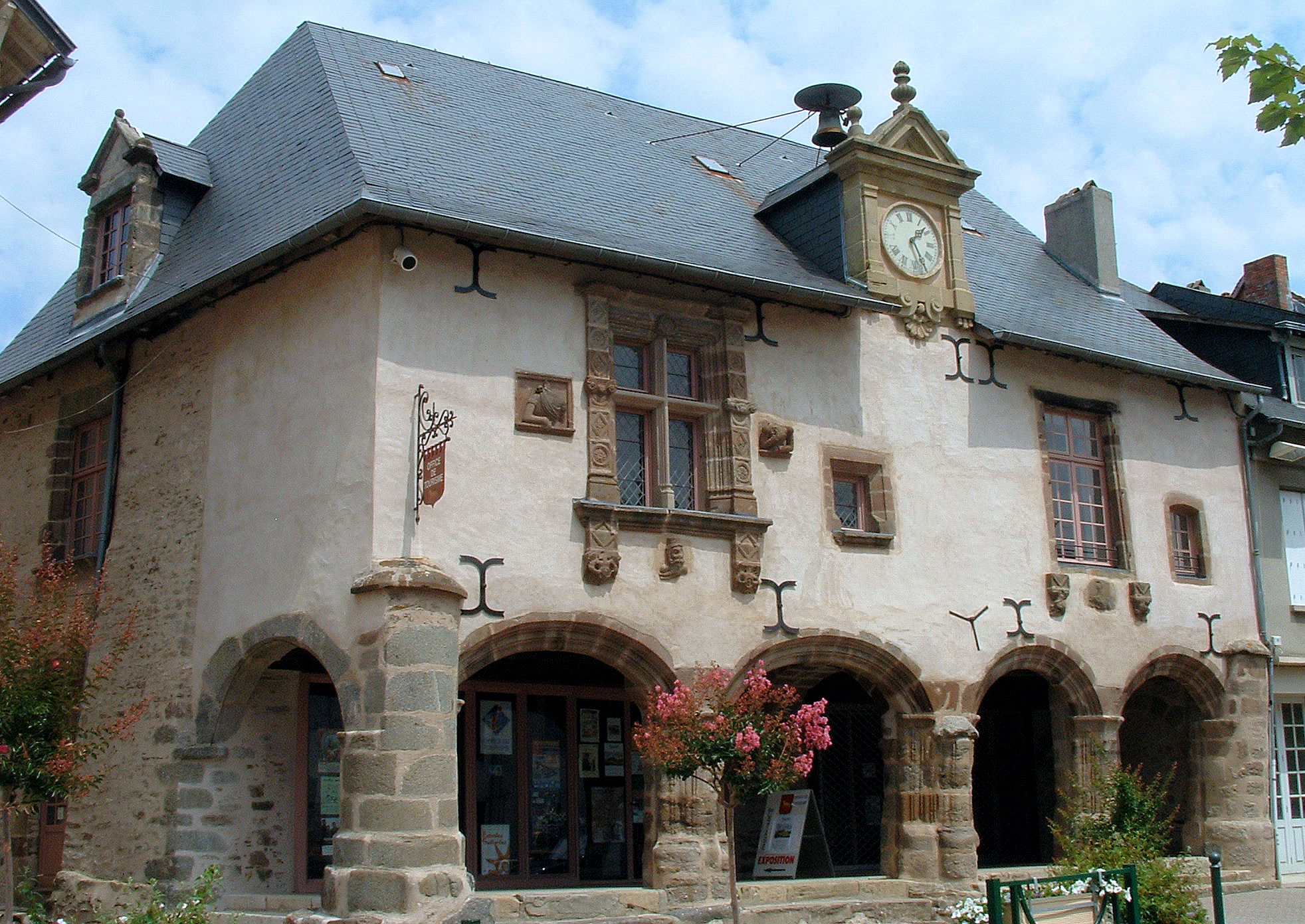 Lubersac - Maison Renaissance